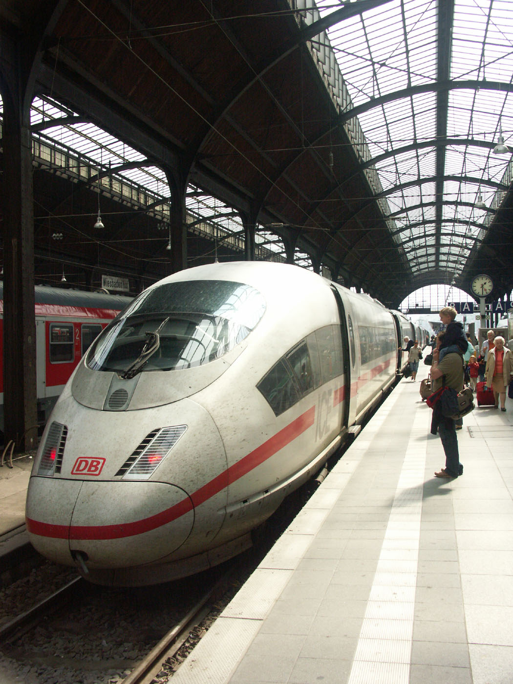 Ein ICE im Wiesbadener Hauptbahnhof an Gleis 8